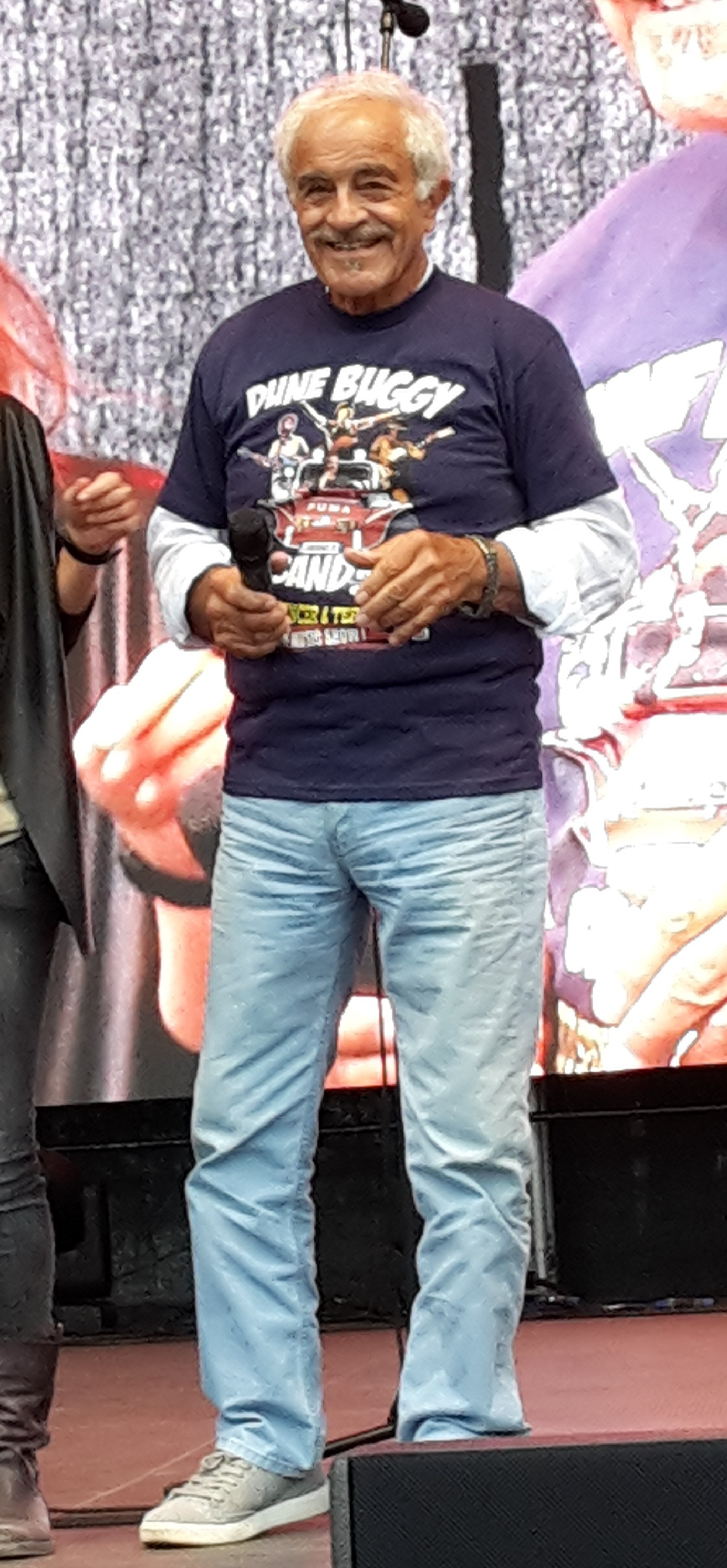 Sal Borgese auf dem "Bud Spencer und Terence Hill Festival" in Lommatzsch 2018.